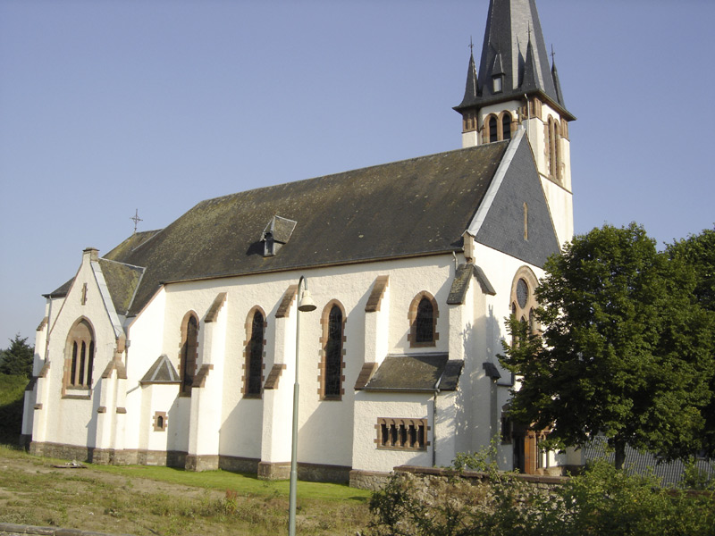 d'Siicht op d'Uerschdreffer Kierch. Allgemenges zum Bild: Dëst Bild weist d'Uerschdreffer Kierch.